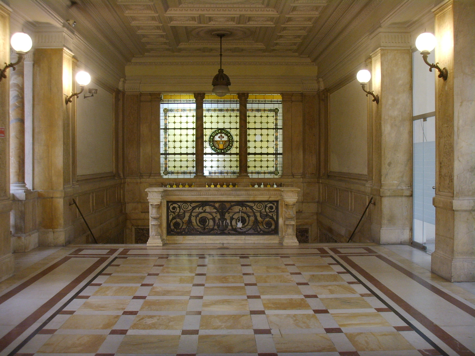 Palazzo delle poste (Firenze), atrio 2